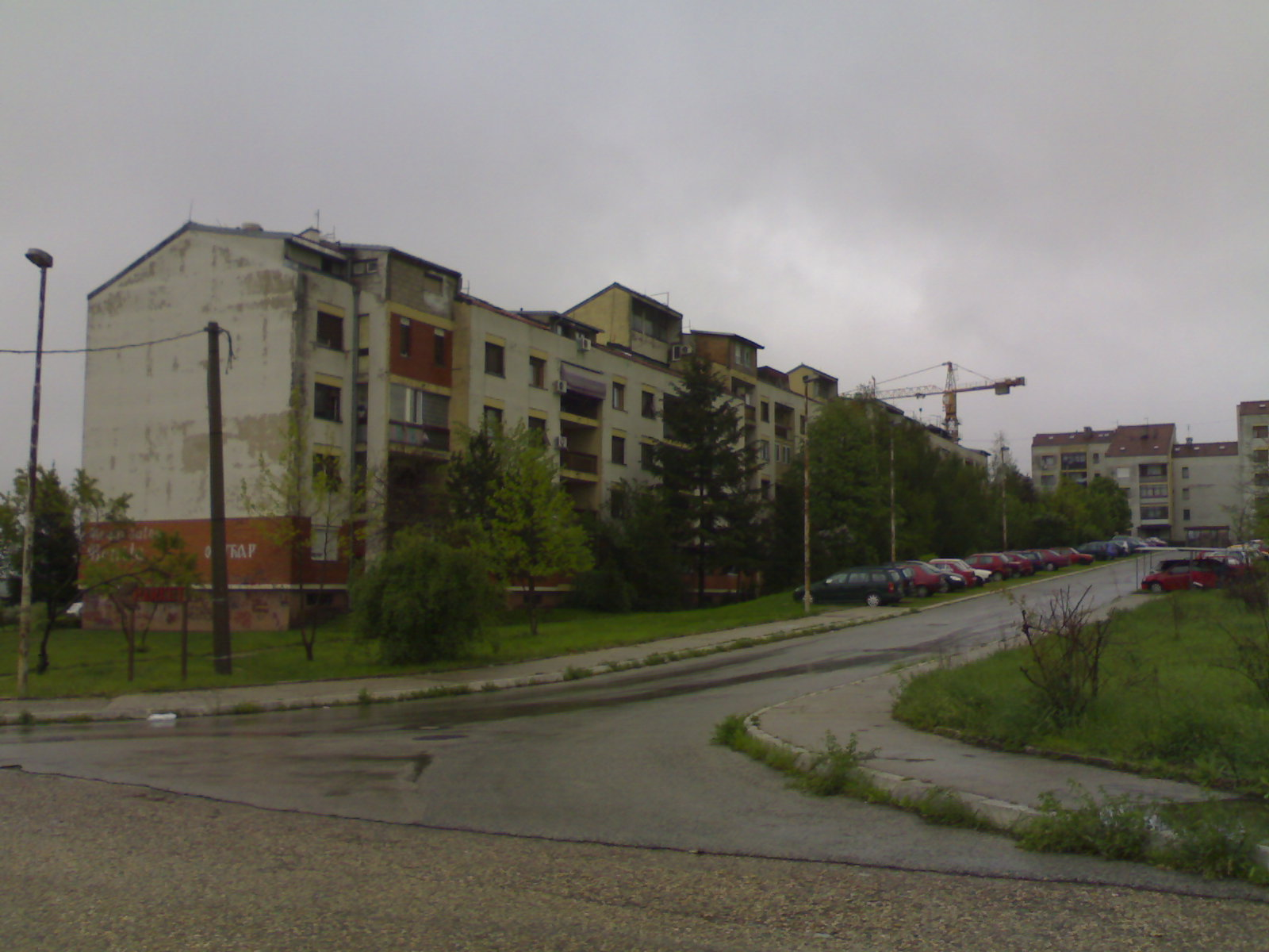 Сремчица-насеље, сликано 25. 4. 2012. Licensing